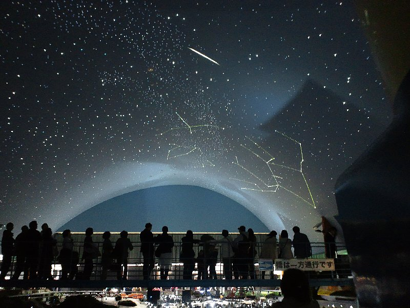 English Chinese